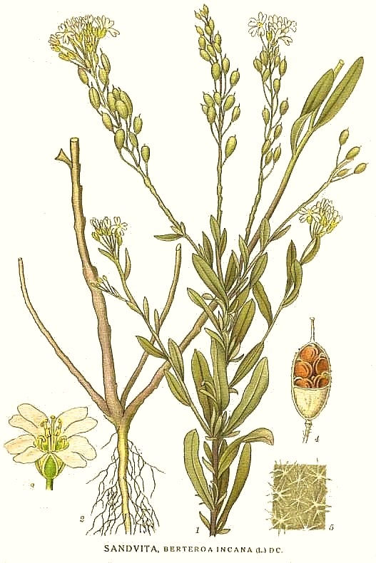 Original Description Sandvita, Berteroa incana (L.) DC.